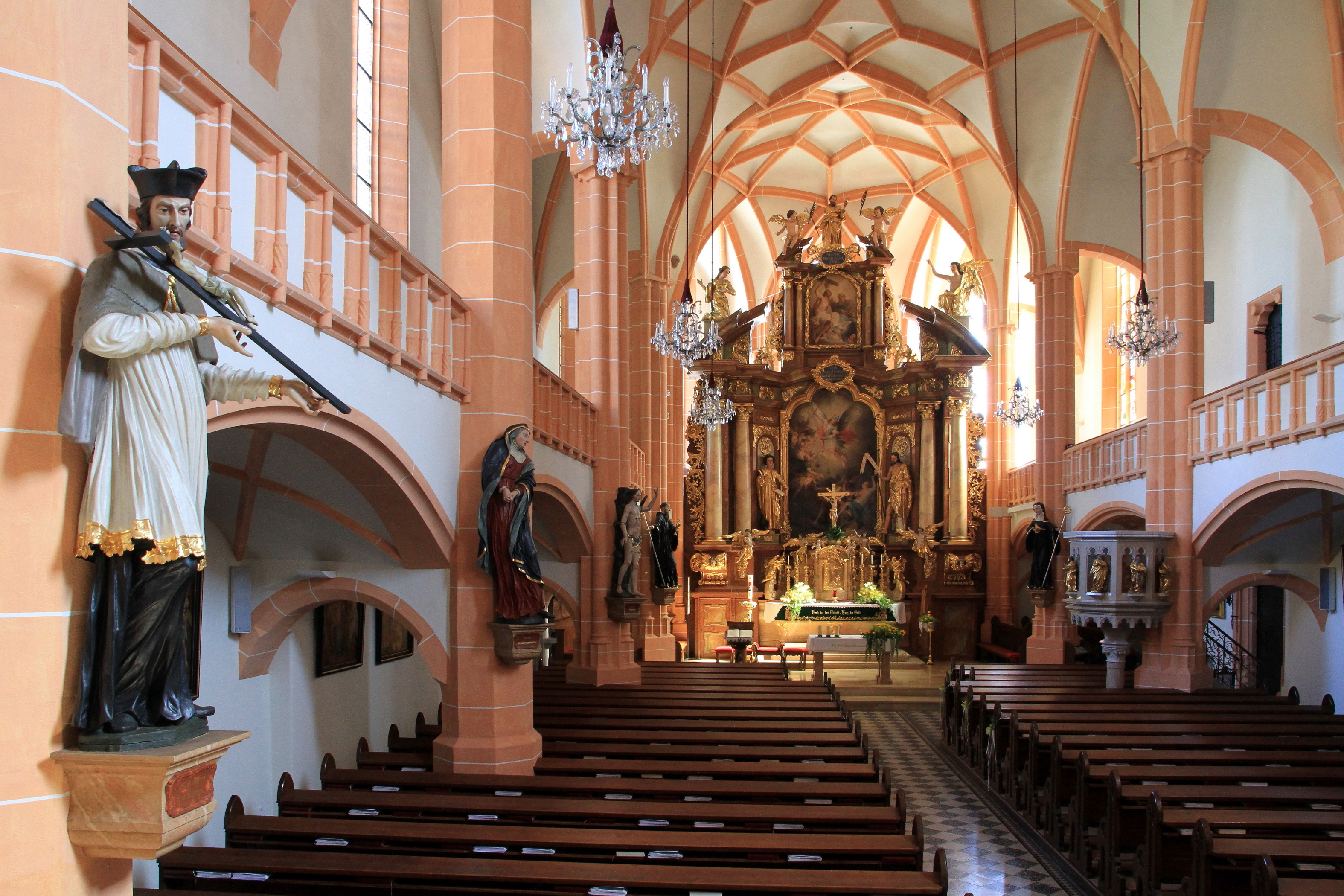 Innenansicht Richtung Hochaltar der katholischen Pfarrkirche hl. Michael der niederösterreichischen Marktgemeinde Steinakirchen am Forst.